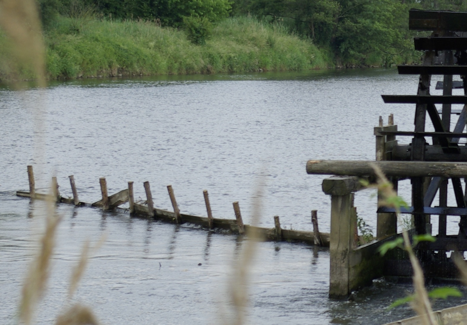 Schöpfrad Kleines Schäferrad an der Regnitz in Möhrendorf.